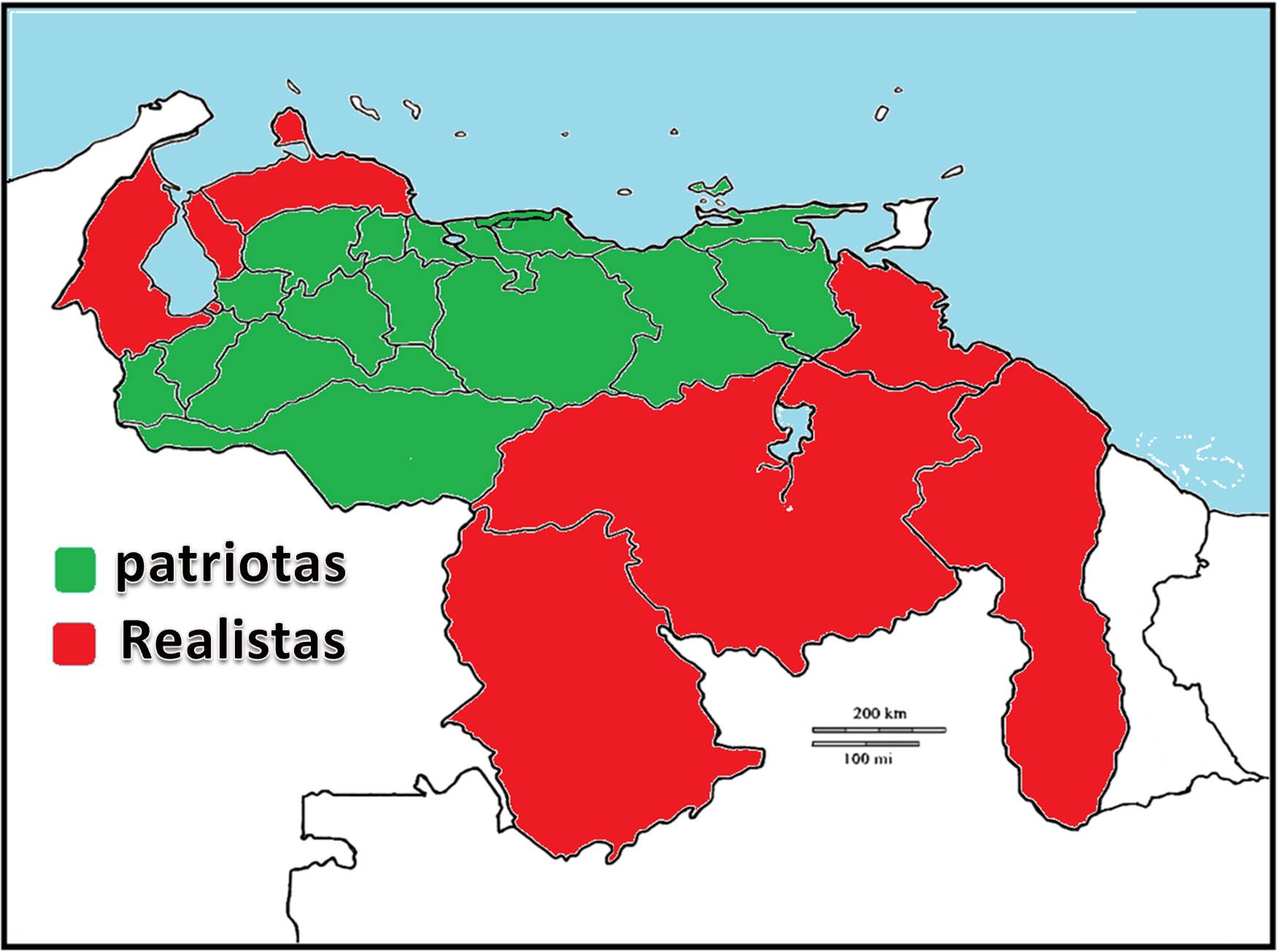 Mapa de las Provincias Unidas de Venezuela